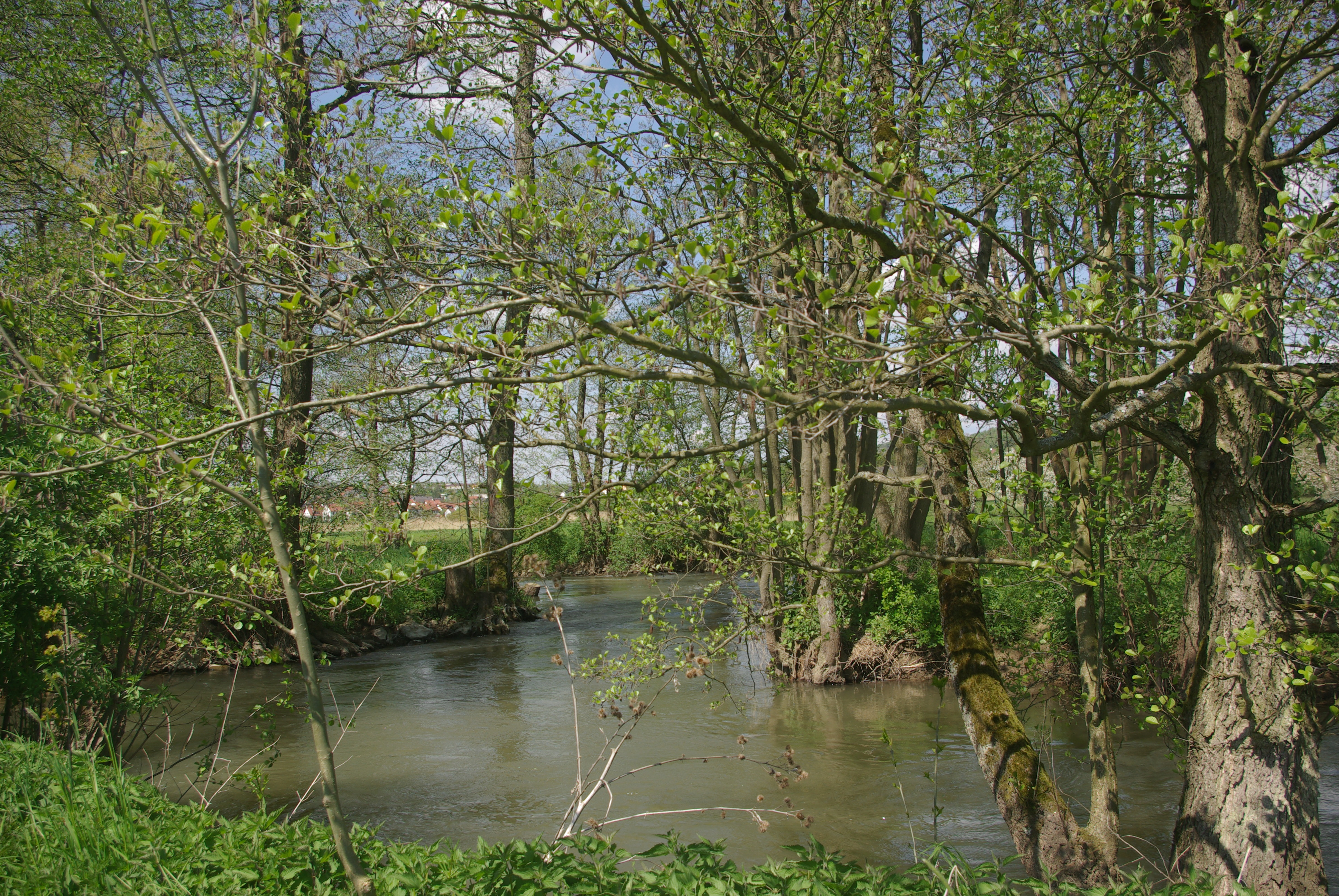 Mündung des Aschbachs in die Wern